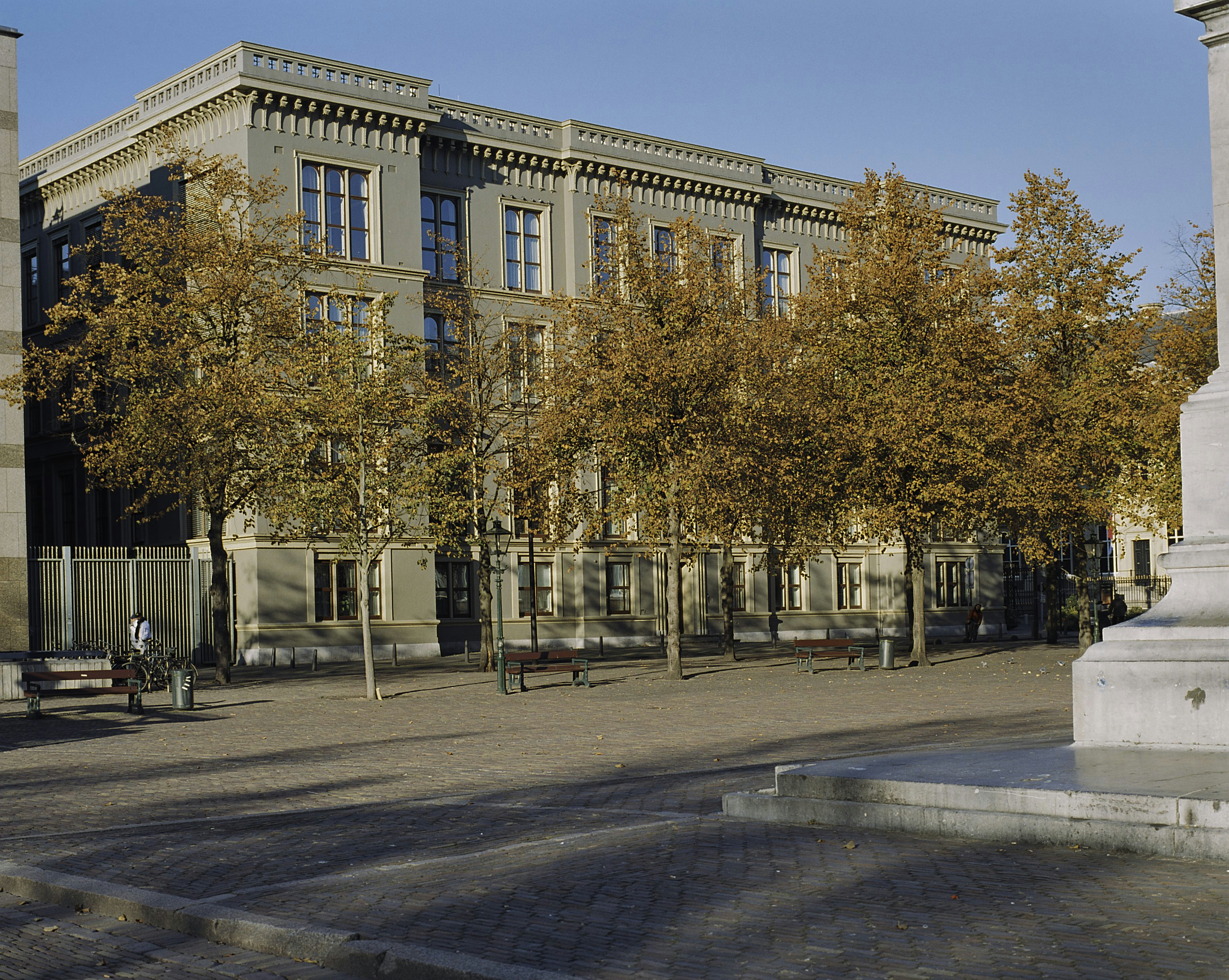 VOORMALIGE MINISTERIE VAN KOLONIEN: Overzicht voorgevel met bomenrij (opmerking: Gefotografeerd voor Monumenten In Nederland Zuid-Holland)